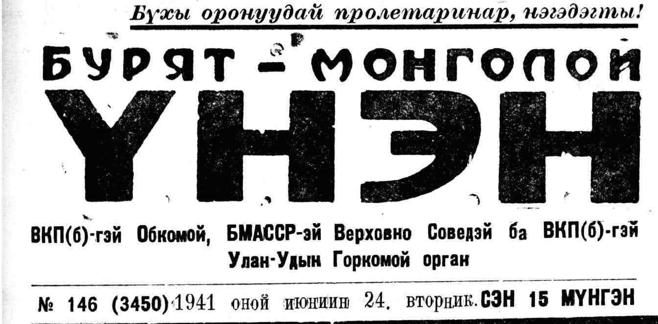 Буряад: Буряад үнэн сониной нюур хуудаһан